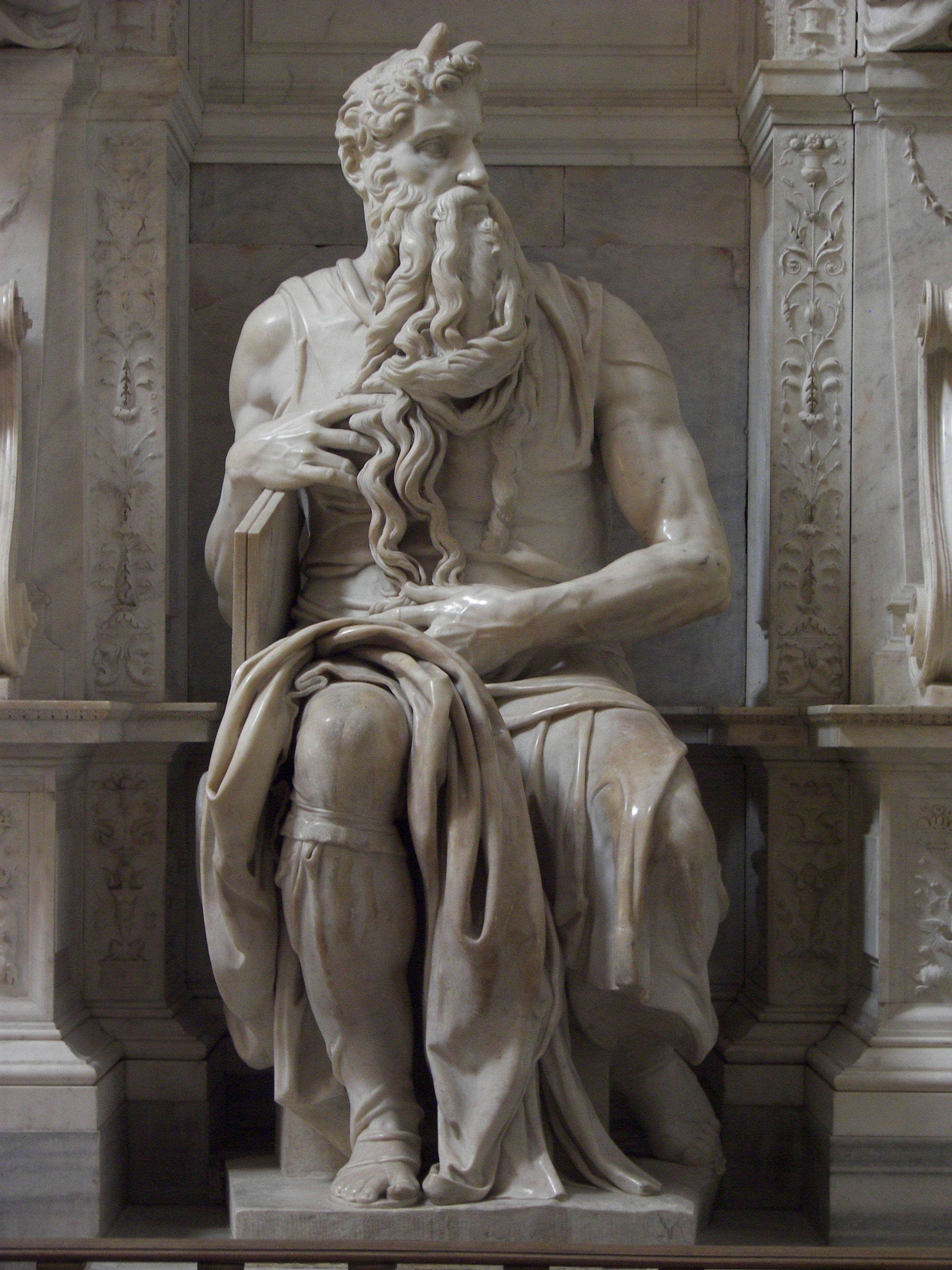 Michelangelo's Moses in San Pietro in Vincoli in Rome.